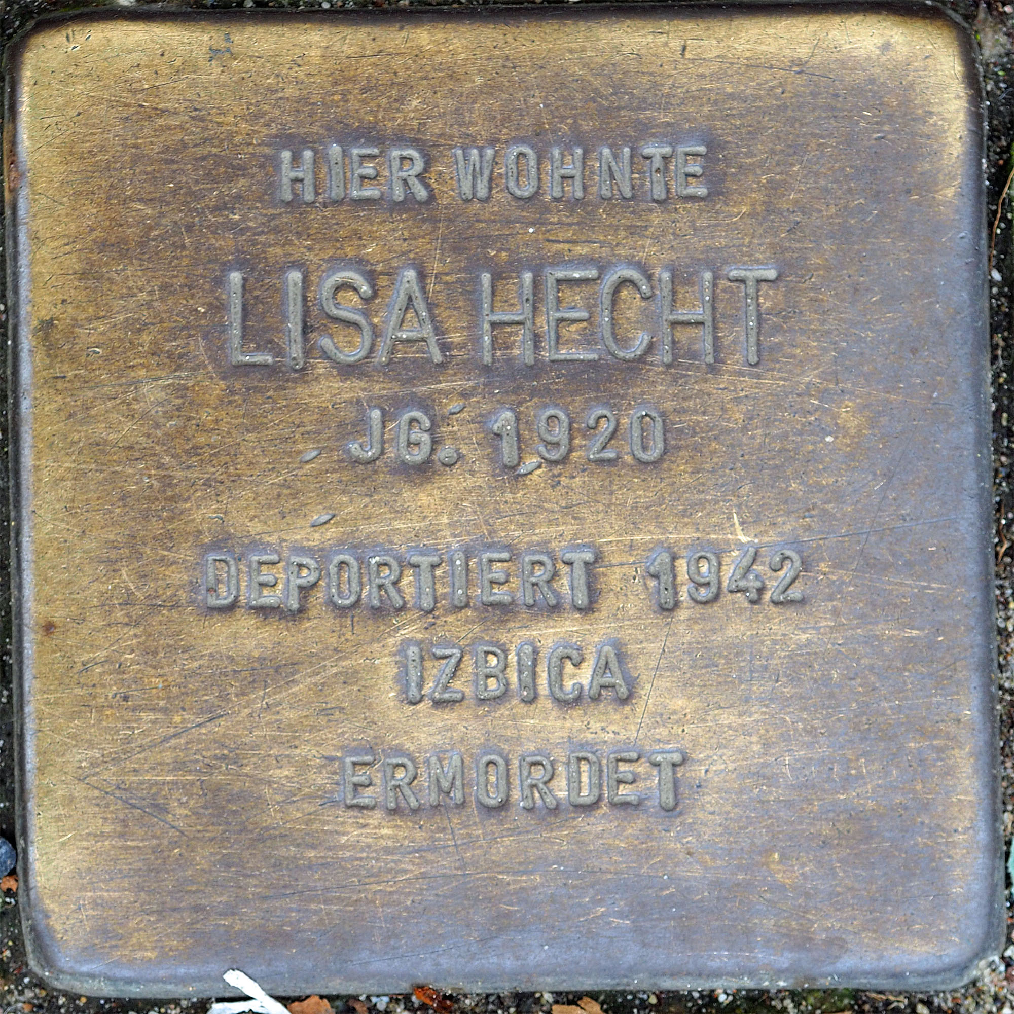 Stolpersteine MG: Hecht, Lisa